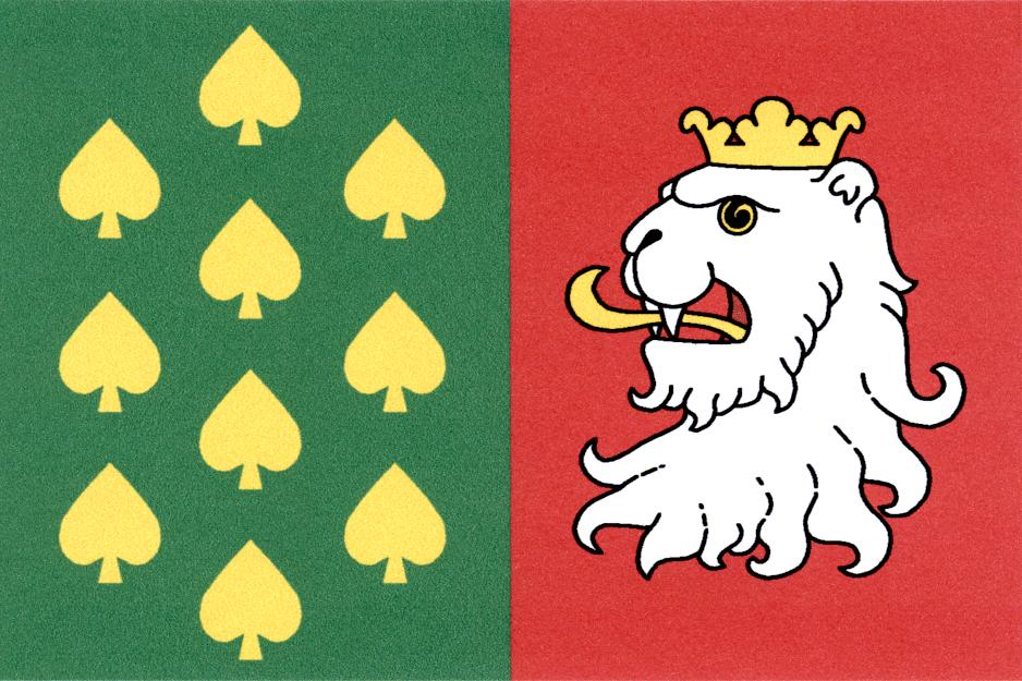 Vlajka obce Tachov (okres Česká Lípa)